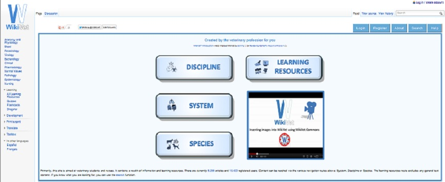 WikiVet screenshot